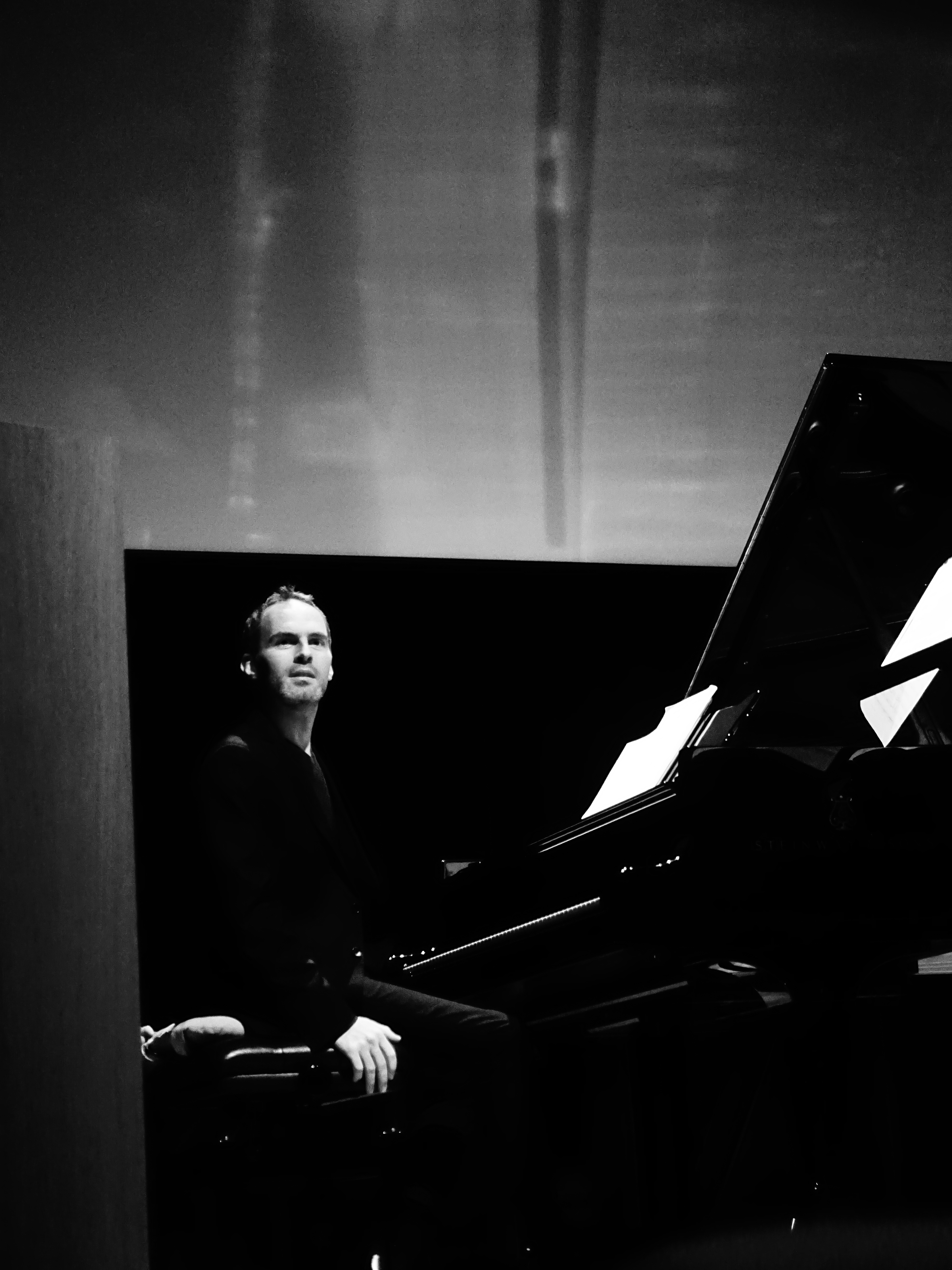 Photographie de David Bismuth en concert au Musée Würth (Décembre 2017)